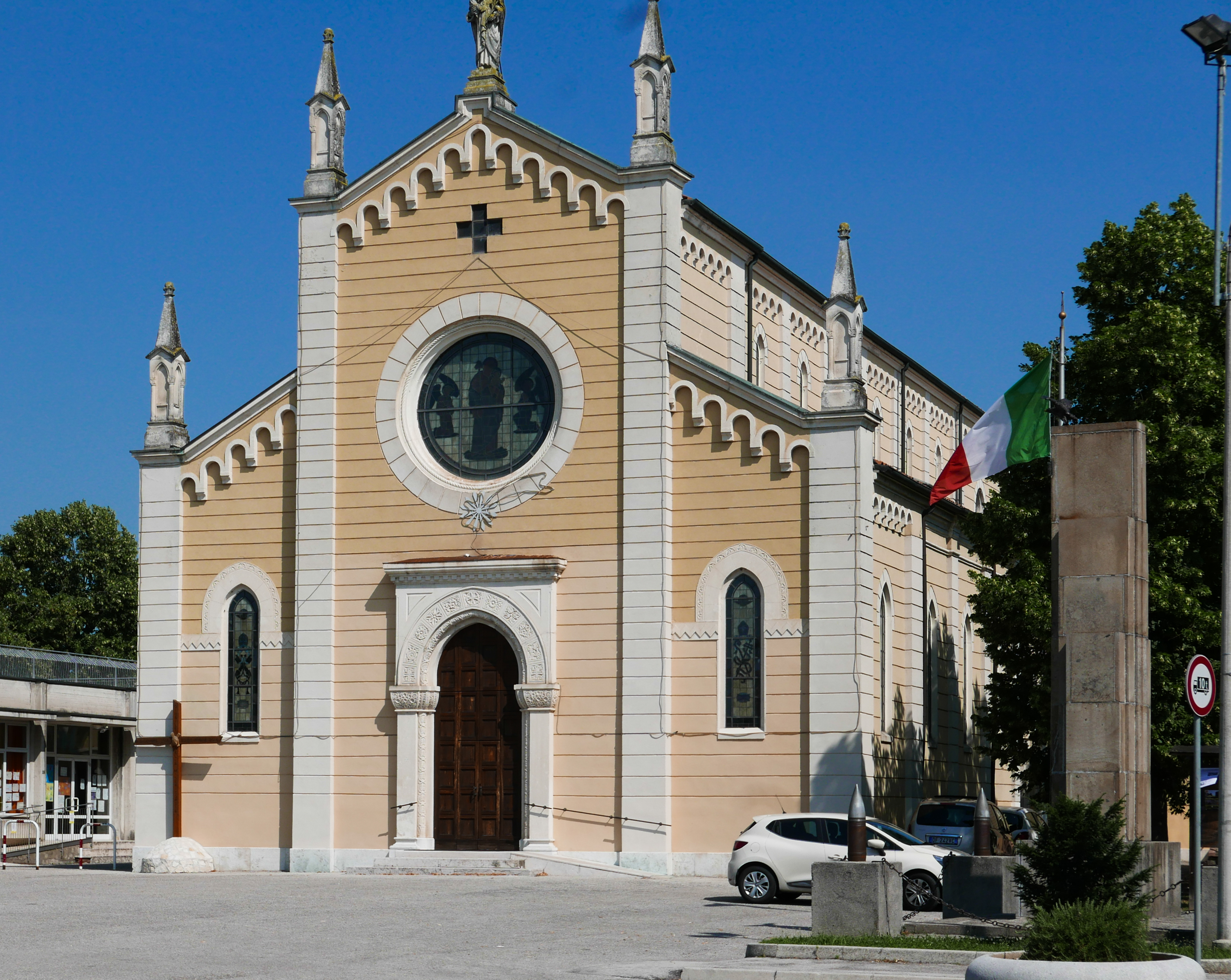 Chiesa parrocchile di San Giuseppe, Maddalene, Vicenza